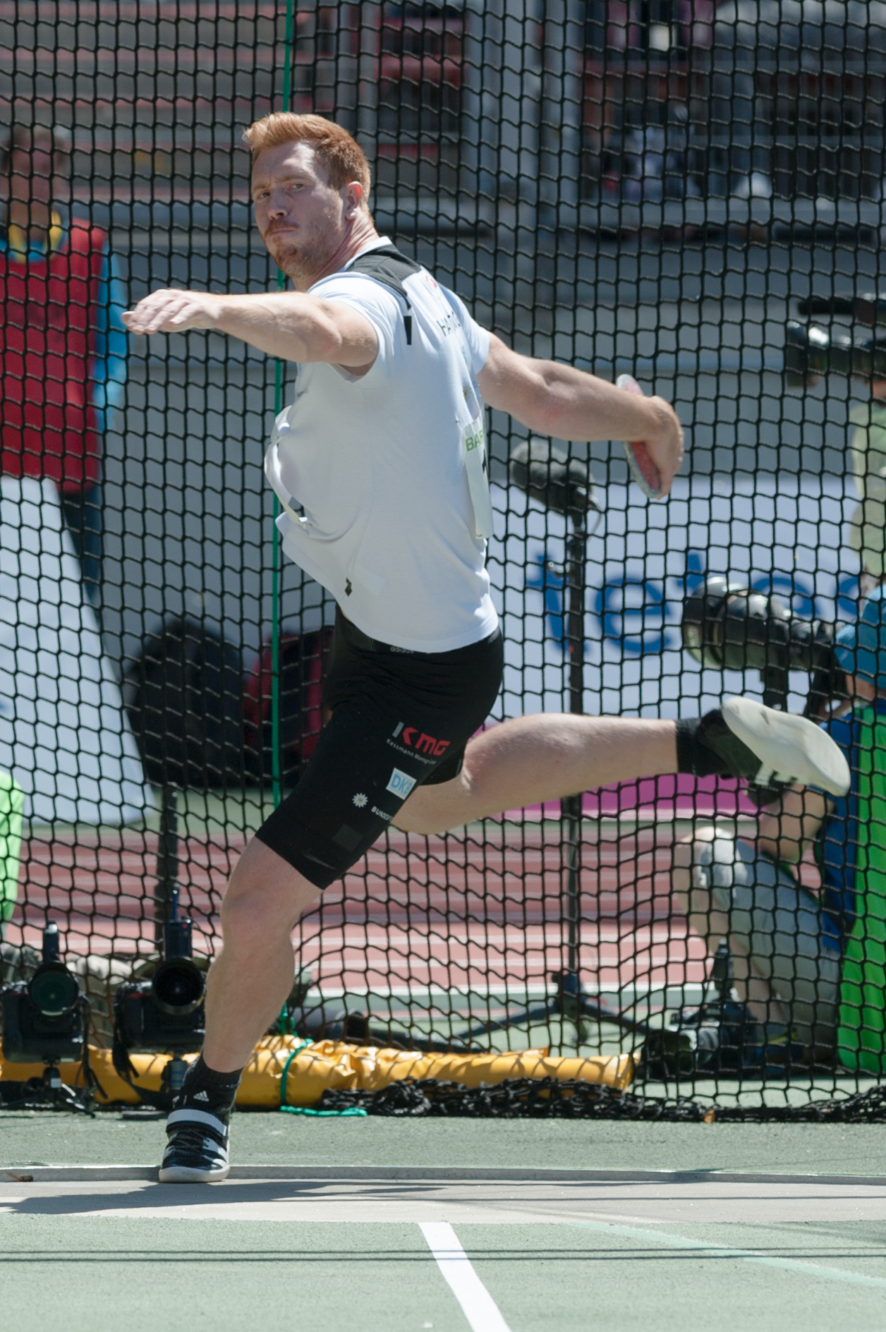 Deutsche Leichtathletik-Meisterschaften 2015: Männer Diskuswurf - Christoph Harting, SCC Berlin